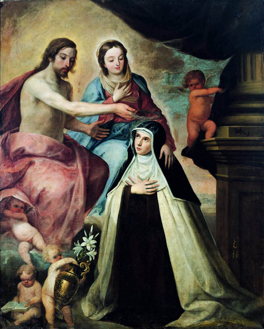 La obra representa a Santa María Magdalena de Pazzi (1566-1607), teniendo una visión de Cristo resucitado y de la Virgen María.